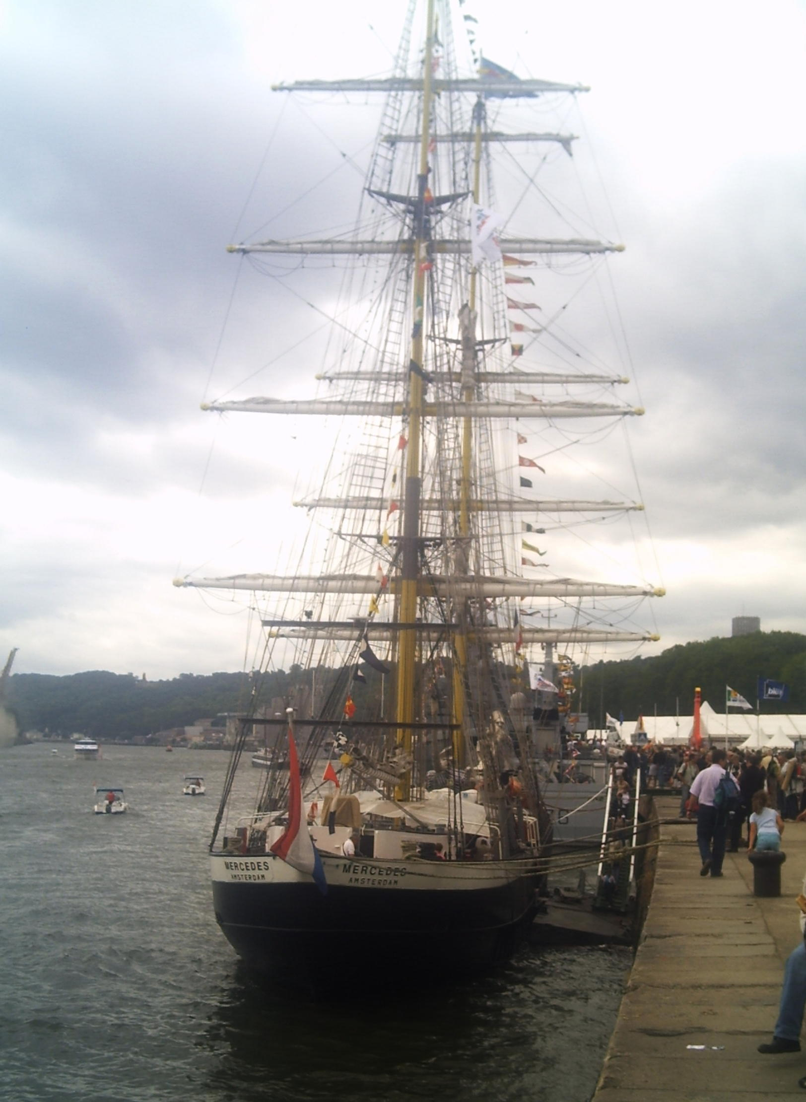 Le brick hollandais Mercedes -Armada de Rouen 2008